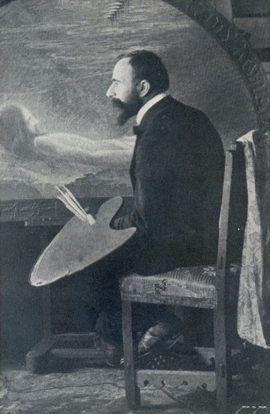 Viktor Foerster (1867-1915), Český malíř a mozajkář